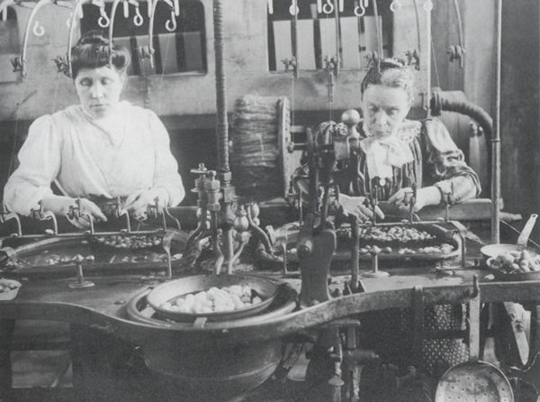 Donne al lavoro alla filanda Puricelli Guerra, fine '800